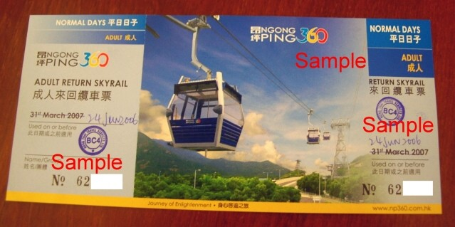 HK Ngong Ping 360 Ticket